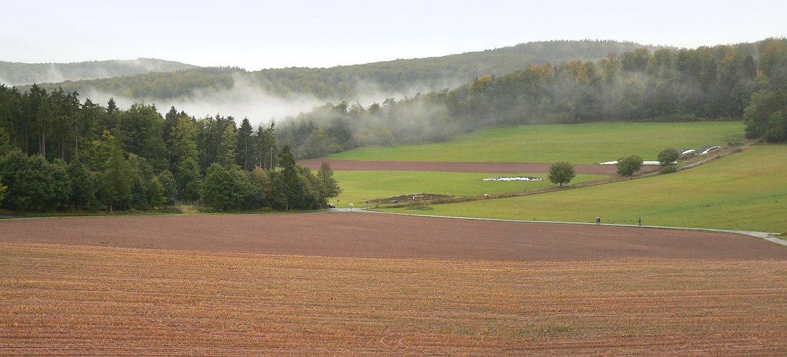 Kellerwald bei Bad Zwesten, Hessen, Deutschland